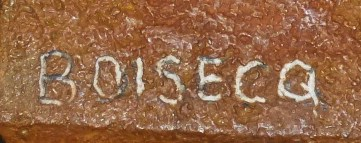 Signature de la scupteure français Simone Boisecq